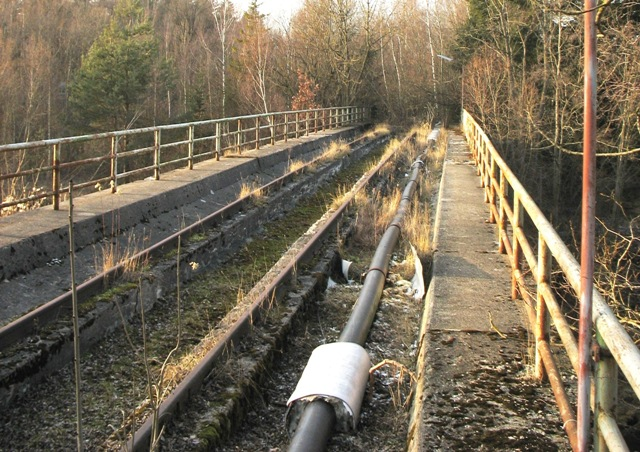 Fasan Sprengstoffwerk in Bobingen, Verbindung Werk 1 und 2